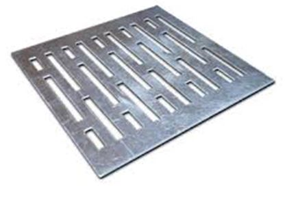 Puntzonatutako xafla